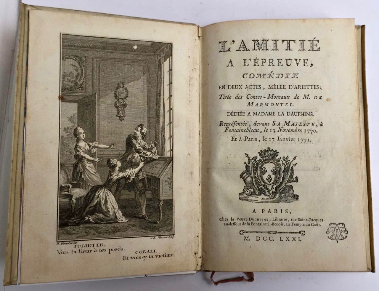 "L’amitié à l’épreuve", Opéra-comique in zwei Akten, 1770. Musik von André-Ernest-Modeste Grétry (1741–1813), Libretto von Charles-Simon Favart (1710–1792) und Claude-Henri Fusée de Voisenon (1708–1775) nach Jean-François Marmontel (1723–1799). Libretto mit Widmung an Marie-Antoinette. Veuve Duchesne, Paris 1771. Frontispiz von Hubert-François Gravelot (1699–1773, Zeichner) und Jean-Baptiste Blaise Simonet (1742–1813, Graveur).